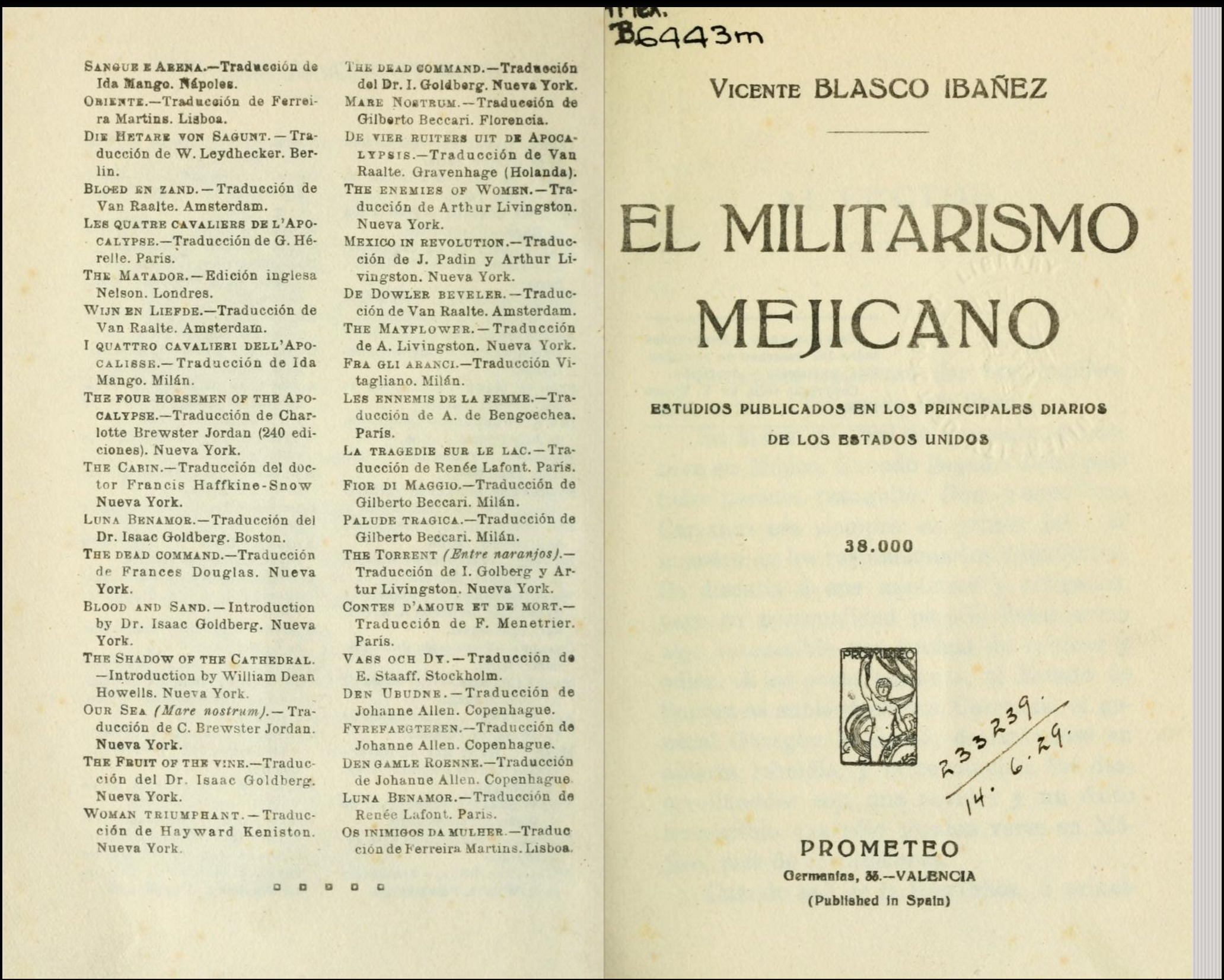 Del lado izquierdo se encuentra parte de la lista de publicaciones de la editorial y del derecho la portadilla del libro, El militarismo mejicano